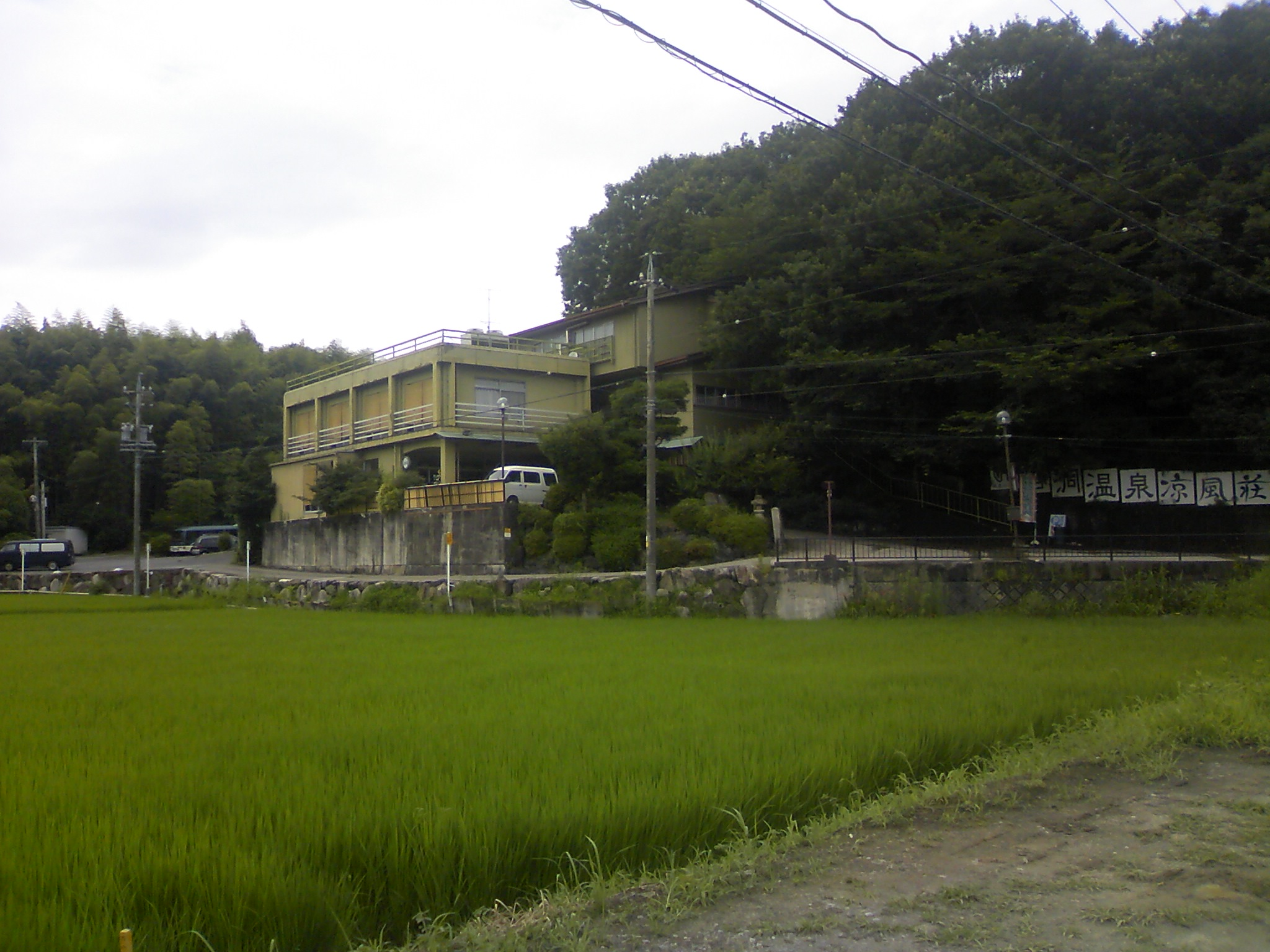 磨洞温泉の外観。（2010年7月15日 投稿者が撮影）